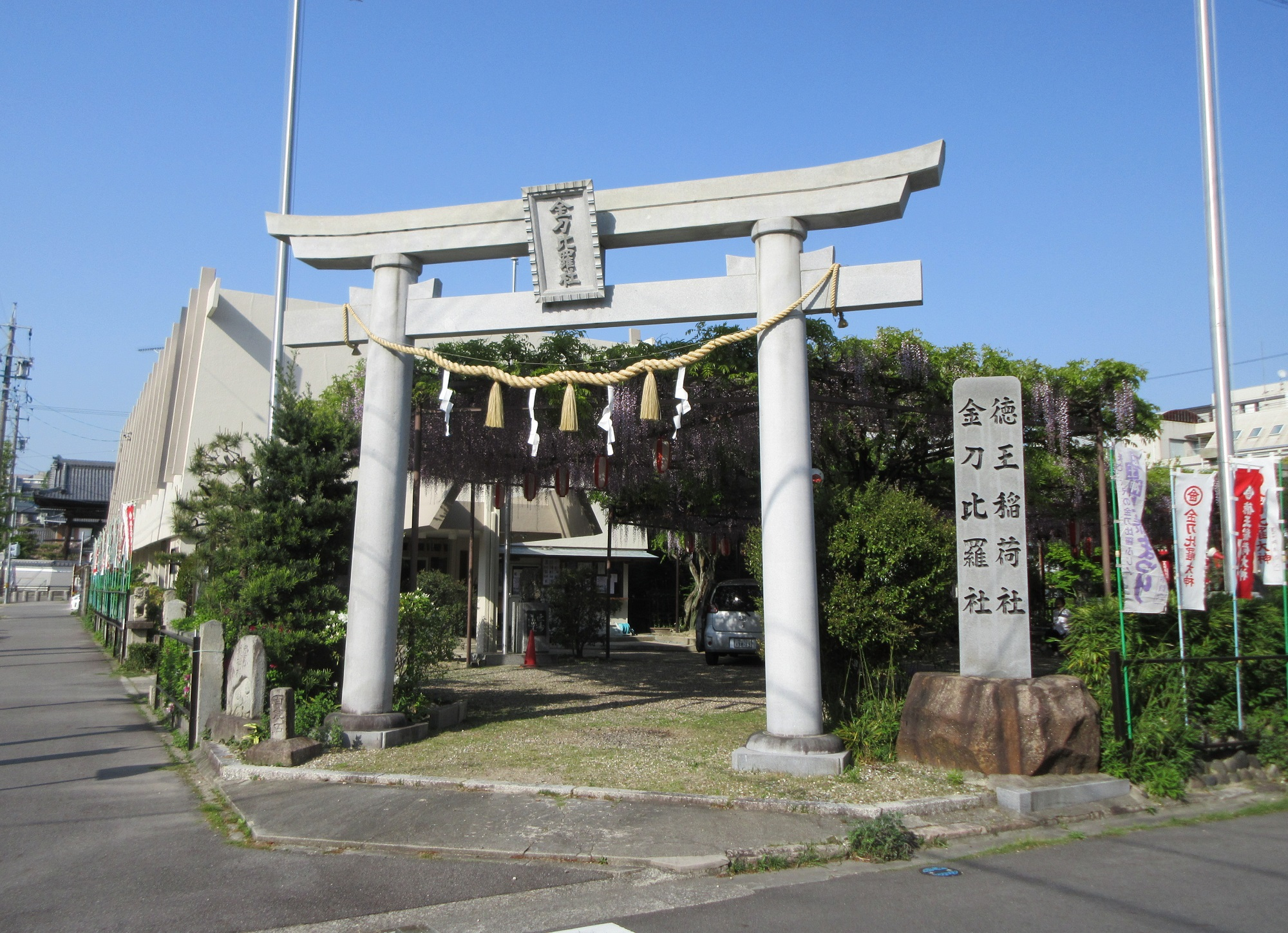 徳王稲荷社金刀比羅社（岡崎市西中町）